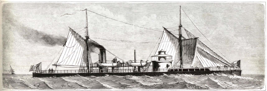 Monitor Atahualpa, Rimac, Huascar, Union